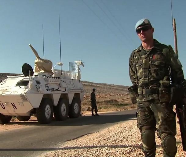 Soldado de la Brigada de Castillejos II en Líbano